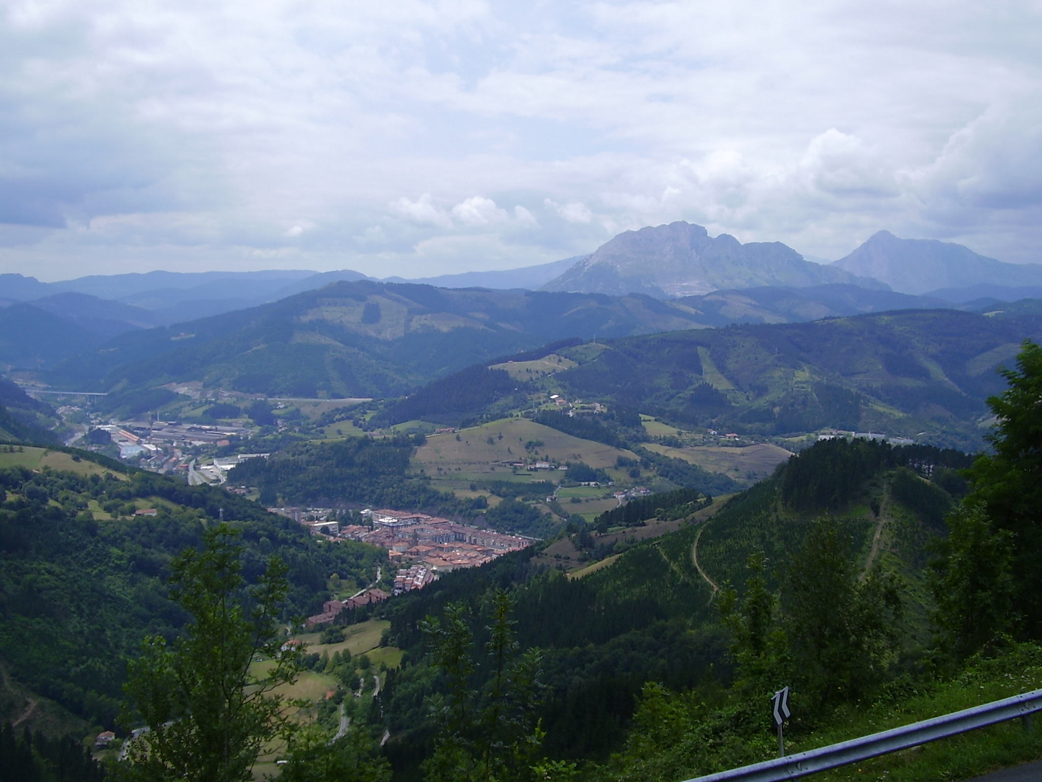 Bergarako ikuspegi orokorra hegoaldetik